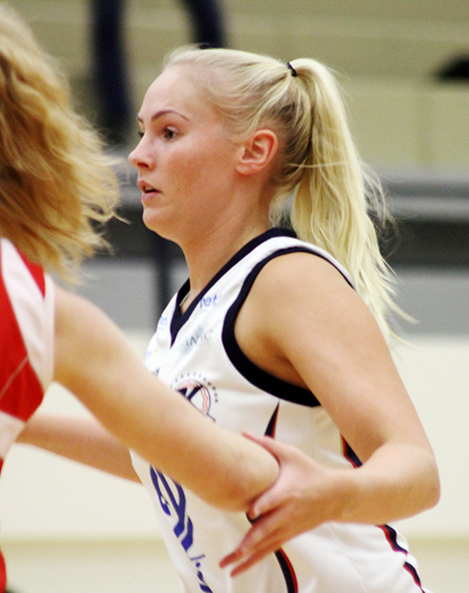 Bryndís Guðmundsdóttir during a Úrvalsdeild kvenna game between Keflavík and Haukar on 14 January 2015.